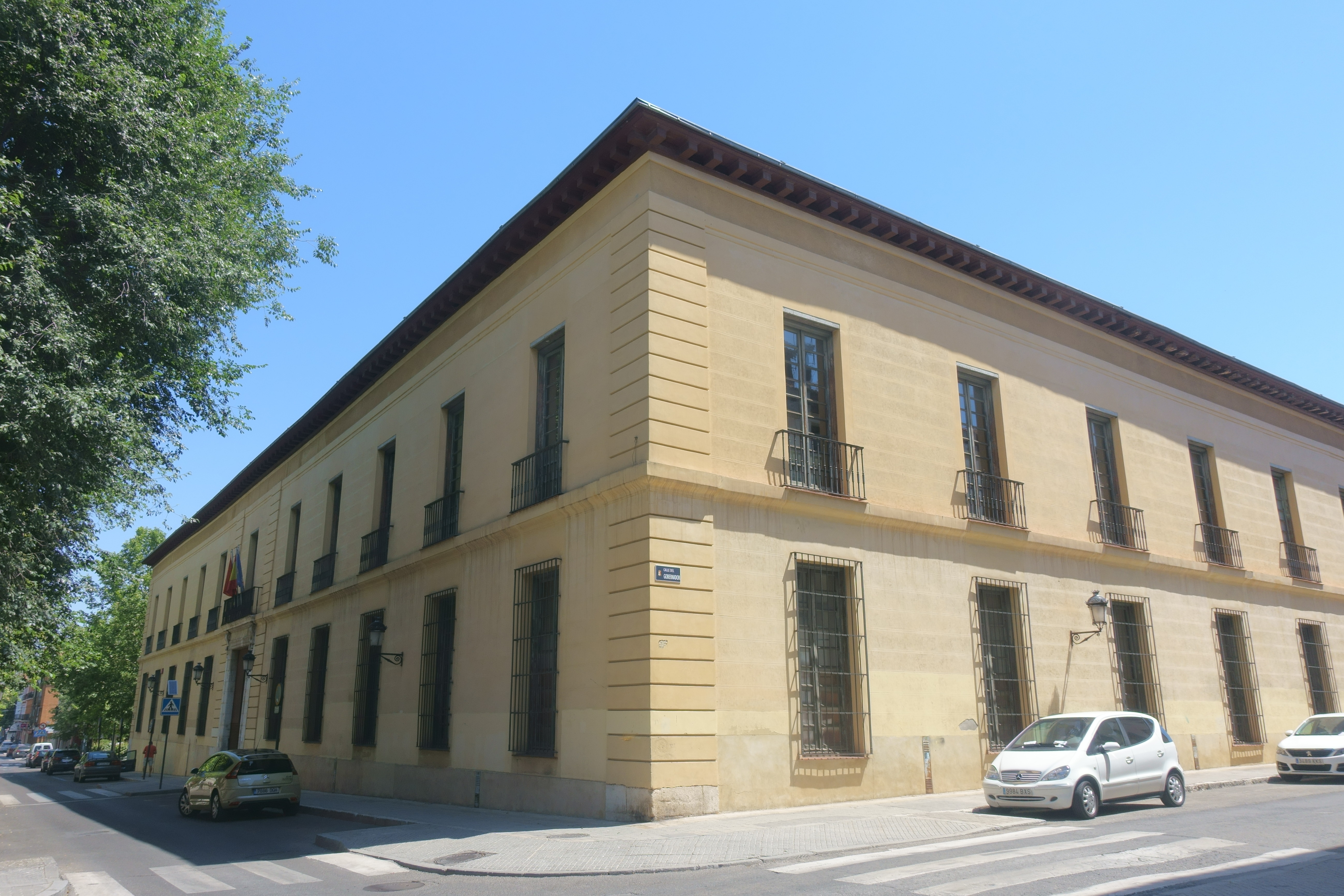 Vista general de las Cocheras de la Reina Madre, actual centro cultural Isabel de Farnesio, en Aranjuez (Madrid, España).